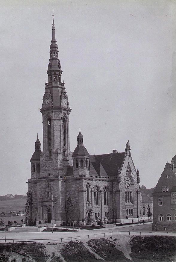 Lukaskirche Dresden Südvorstadt Nordwestansicht ca. 1903